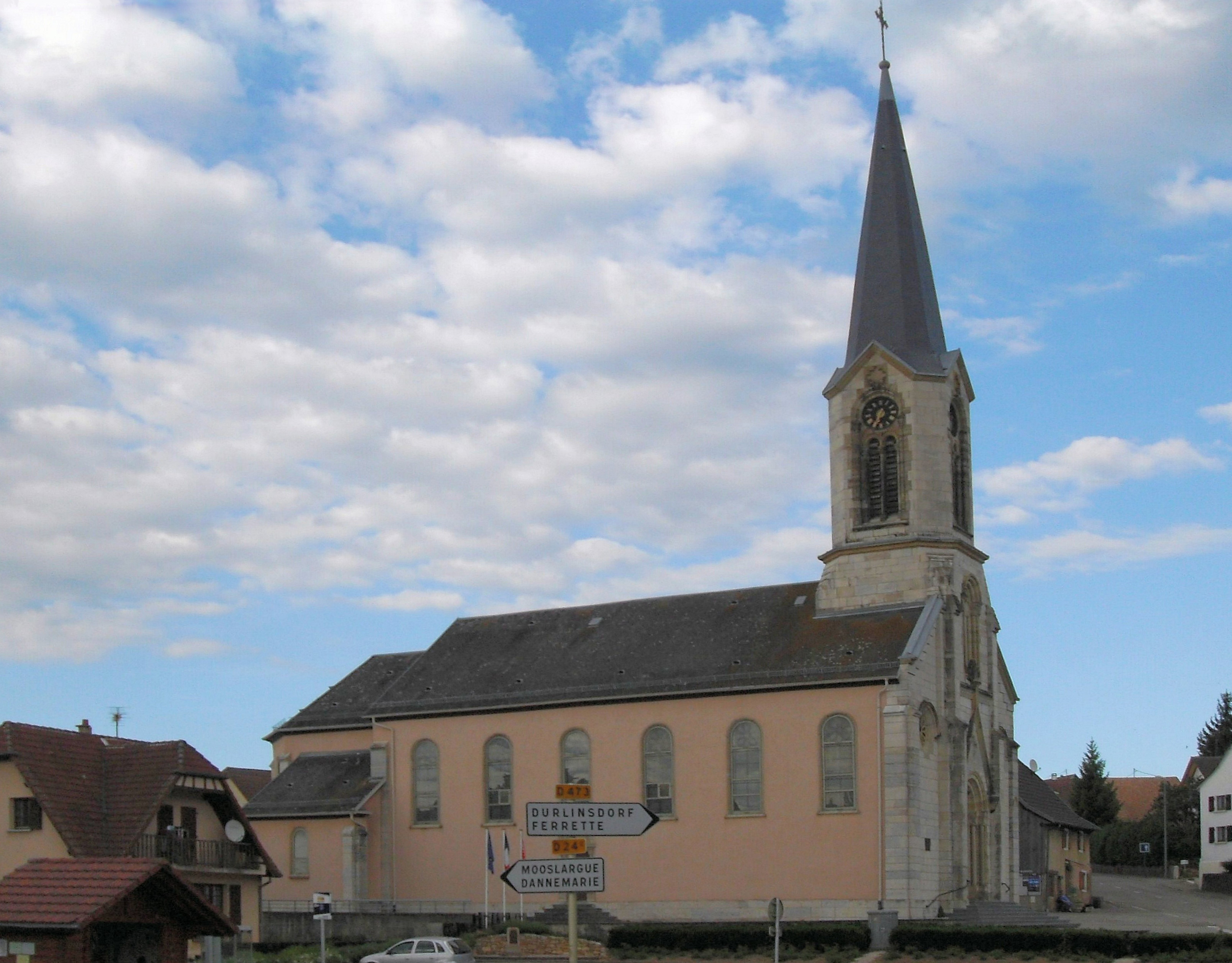 L'église Saint-Jean-Gualbert à Liebsdorf